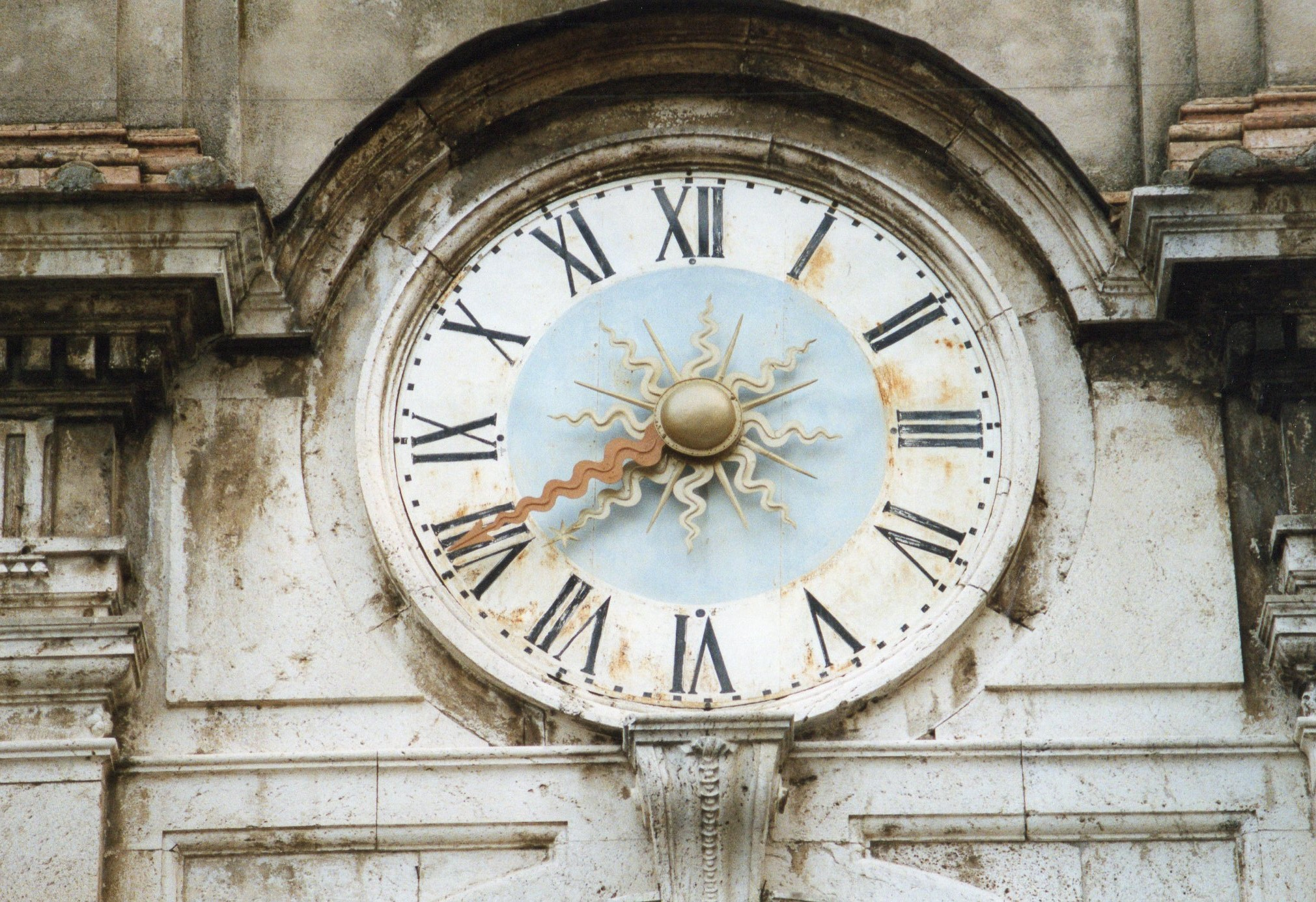 Quadrante dell'orologio in Piazza del Mercato a Spoleto